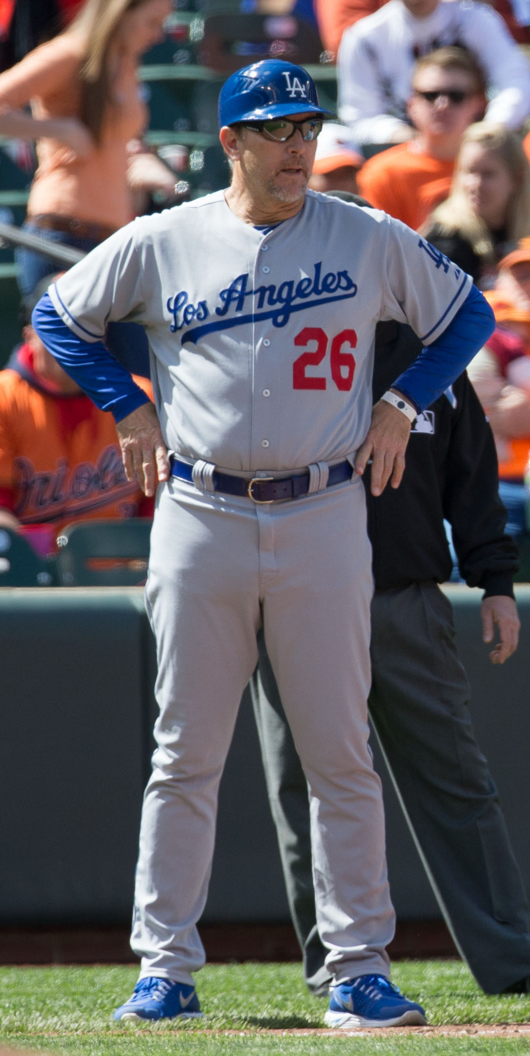 Tim Wallach